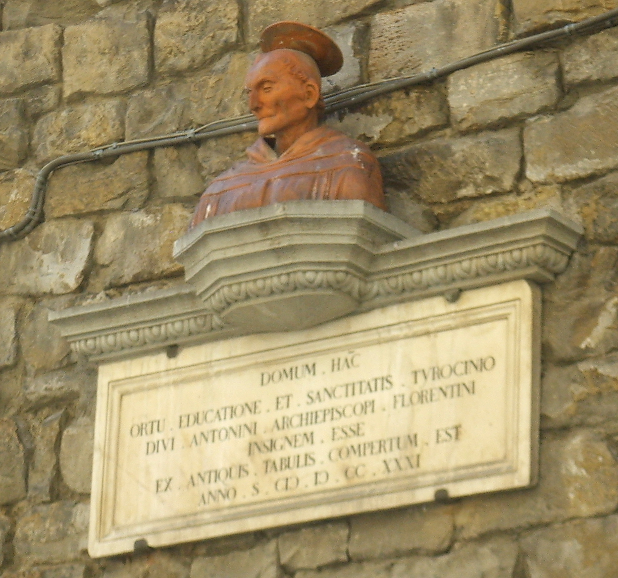 Home of Sant'Antonino, plate Torre dei Pierozzi in Florence, italy